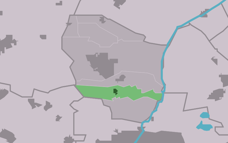 Kaartsje fan himrik fan Koarnjum